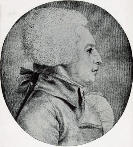 Portret van Cornelis Johan de Lange, heer van Wijngaarden en Ruigbroek, regent en geschiedschrijver te Gouda